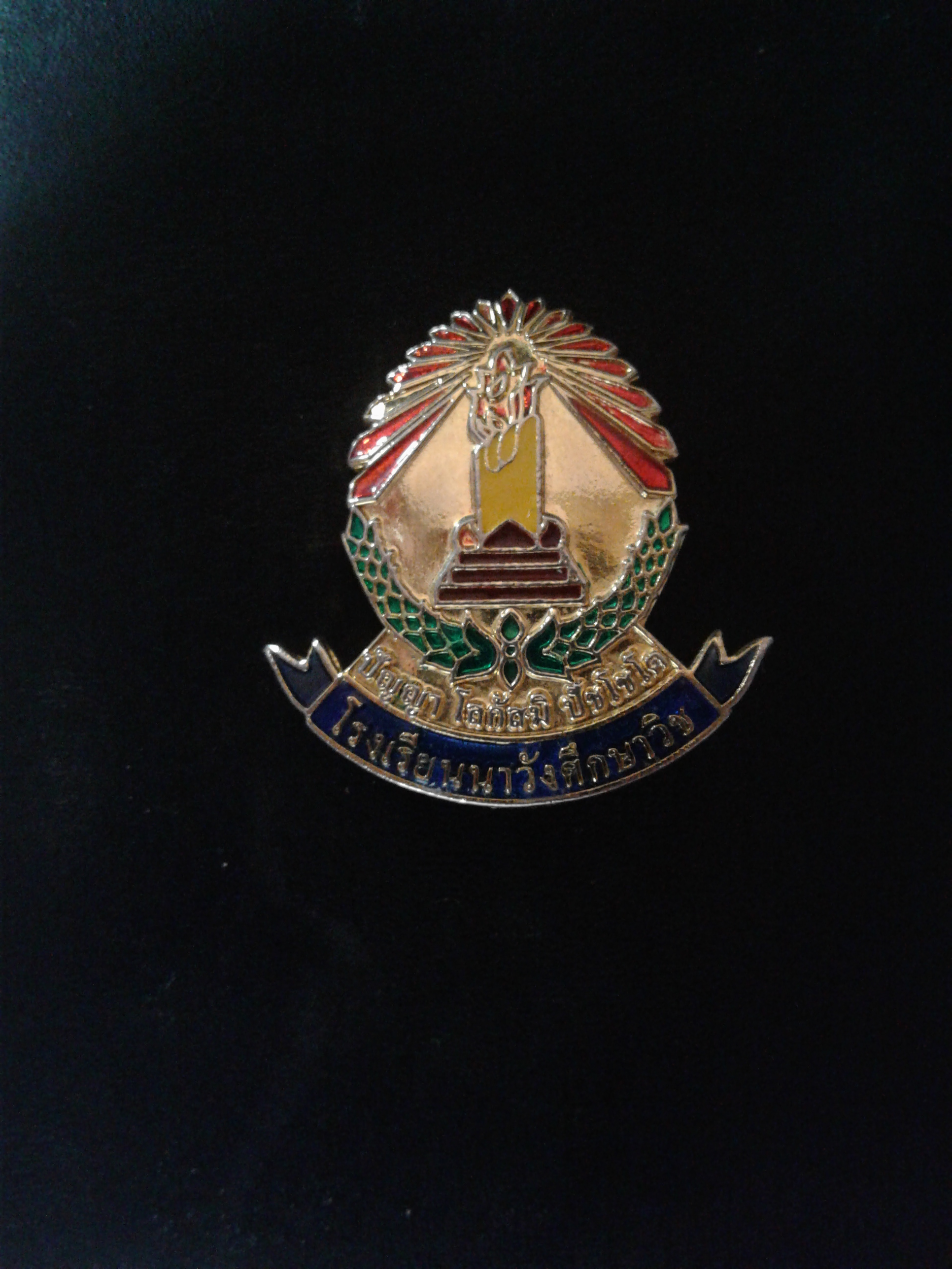 เข็มกลัดนาวัง